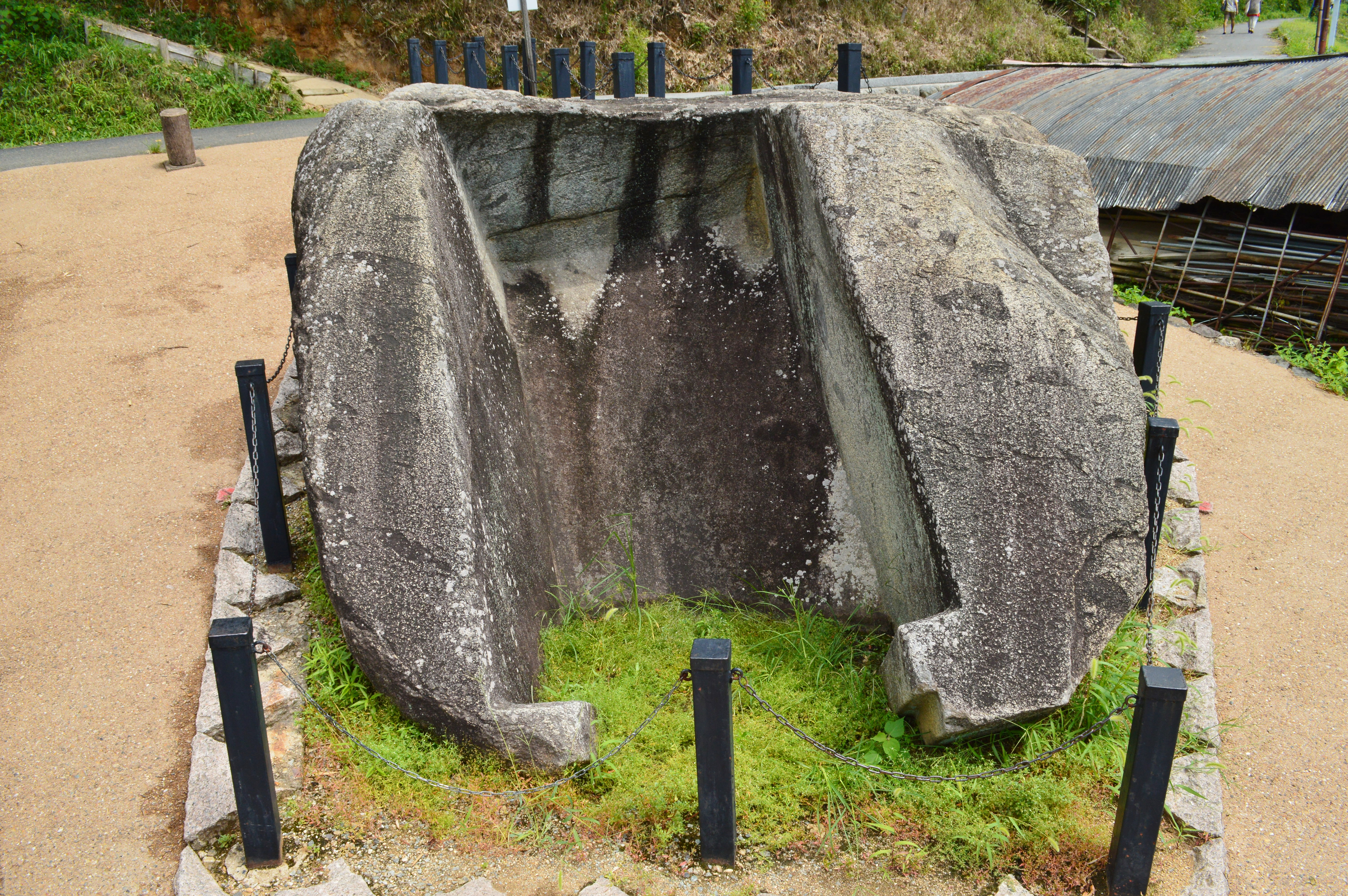 鬼の雪隠 全景